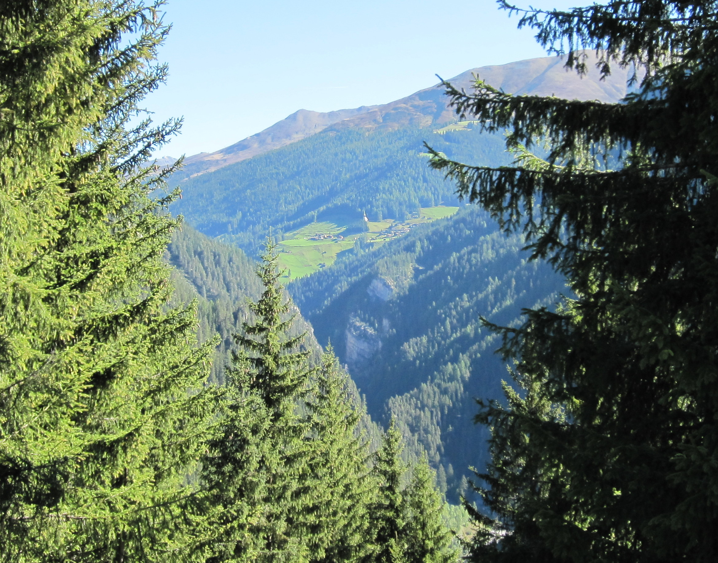 Zügenschlucht im Landwassertal (Kanton Graubünden, nahe Davos)